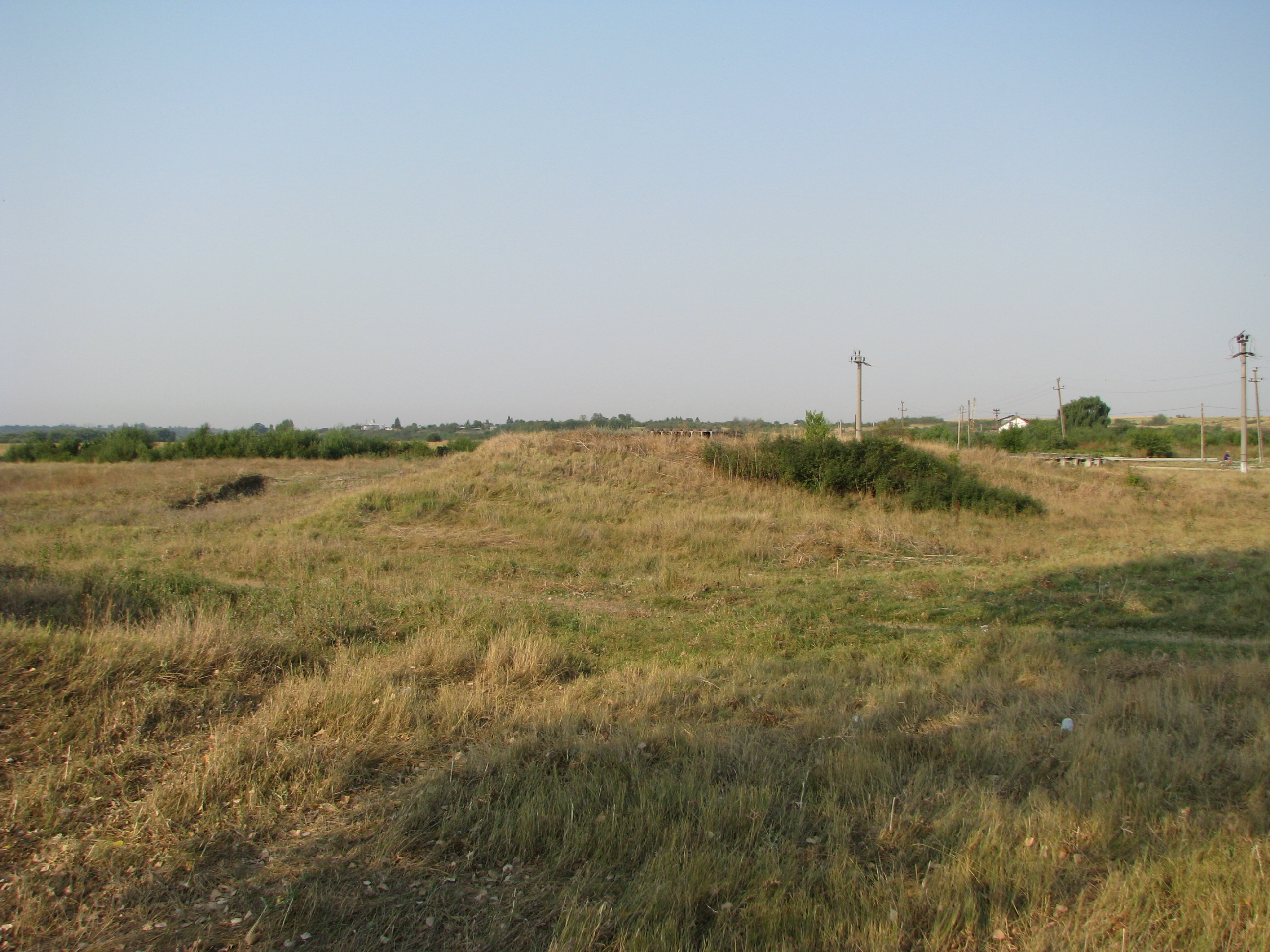 Așezarea de tip tell de la Bucșani, punct "La pod". Imagine de ansamblu